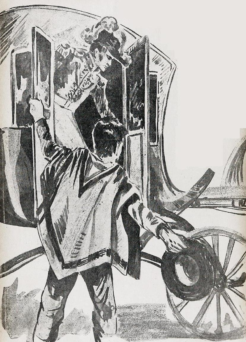 Manuel Rodríguez tuvo la osadía abrirle la puerta del carruaje al mismísimo Casimiro Marcó del Pont a la salida del edificio gubernamental y además recibir una moneda por el servicio de parte del gobernador; esta proeza de gran riesgo causó las más grandes burlas de toda la población de Santiago hacia su gobernante.